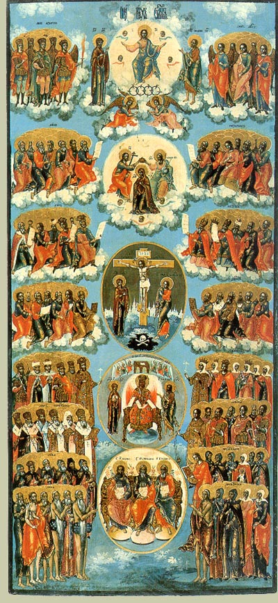 Россия. XVIII век. Дерево, темпера. Размер - 98 х 44 см. Иконография Образ Всех Святых Центральная ось иконы сверху вниз - "Христос во славе" ("Деисус"); "Коронование Богоматери"; "Распятие"; "София"; "Лоно Авраамово". По обоим сторонам от центральных медальонов расположены лики святых. Сверху вниз - небесные силы; праотцы; пророки; апостолы; праведные цари и царицы; святители и мученики; преподобные мужи и жены; пустынники и пустынницы. Происхождение Неизвестно Местонахождение Государственная Третьяковская Галерея (№ ДР 1949).